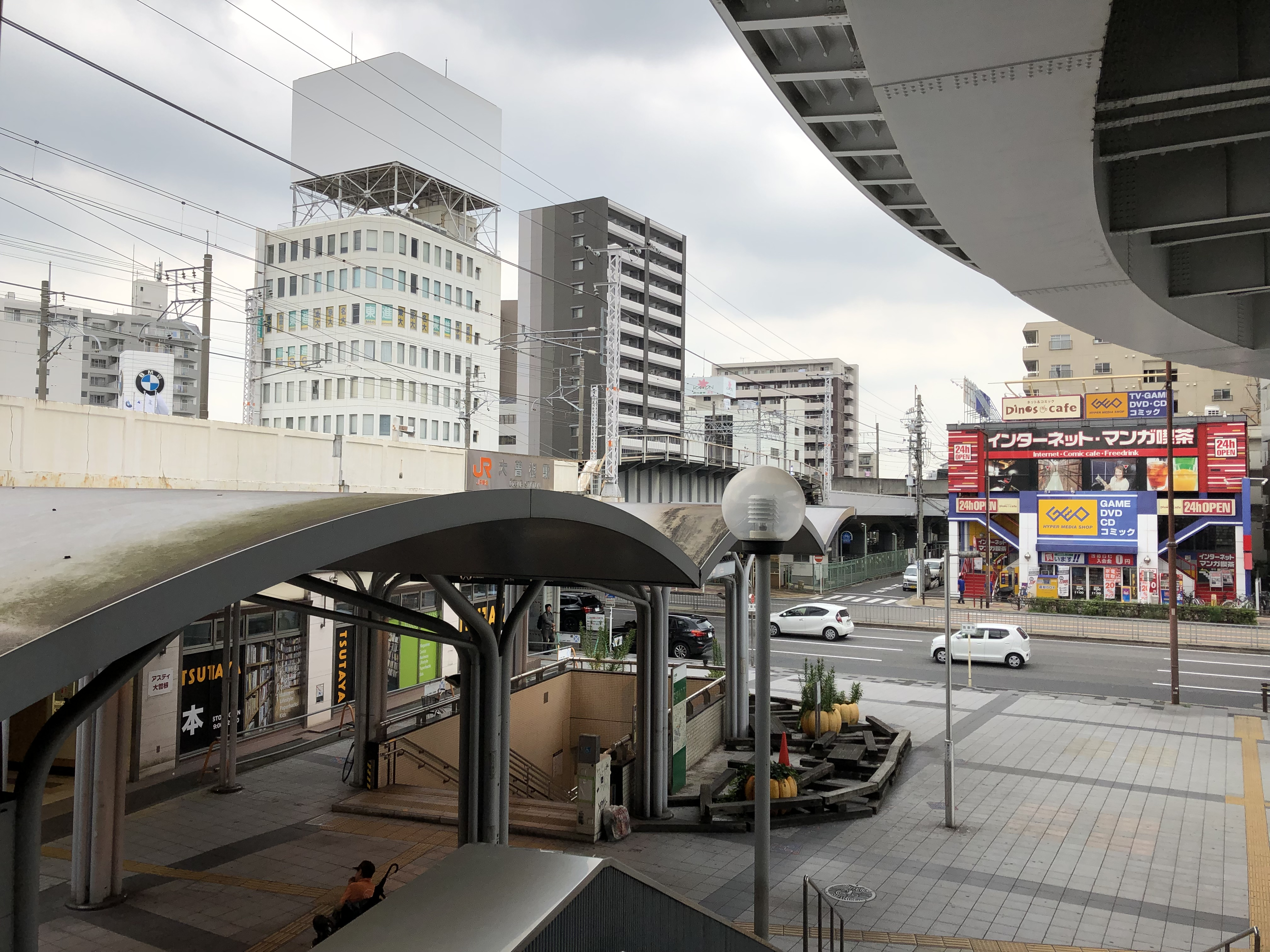 大曽根駅周辺